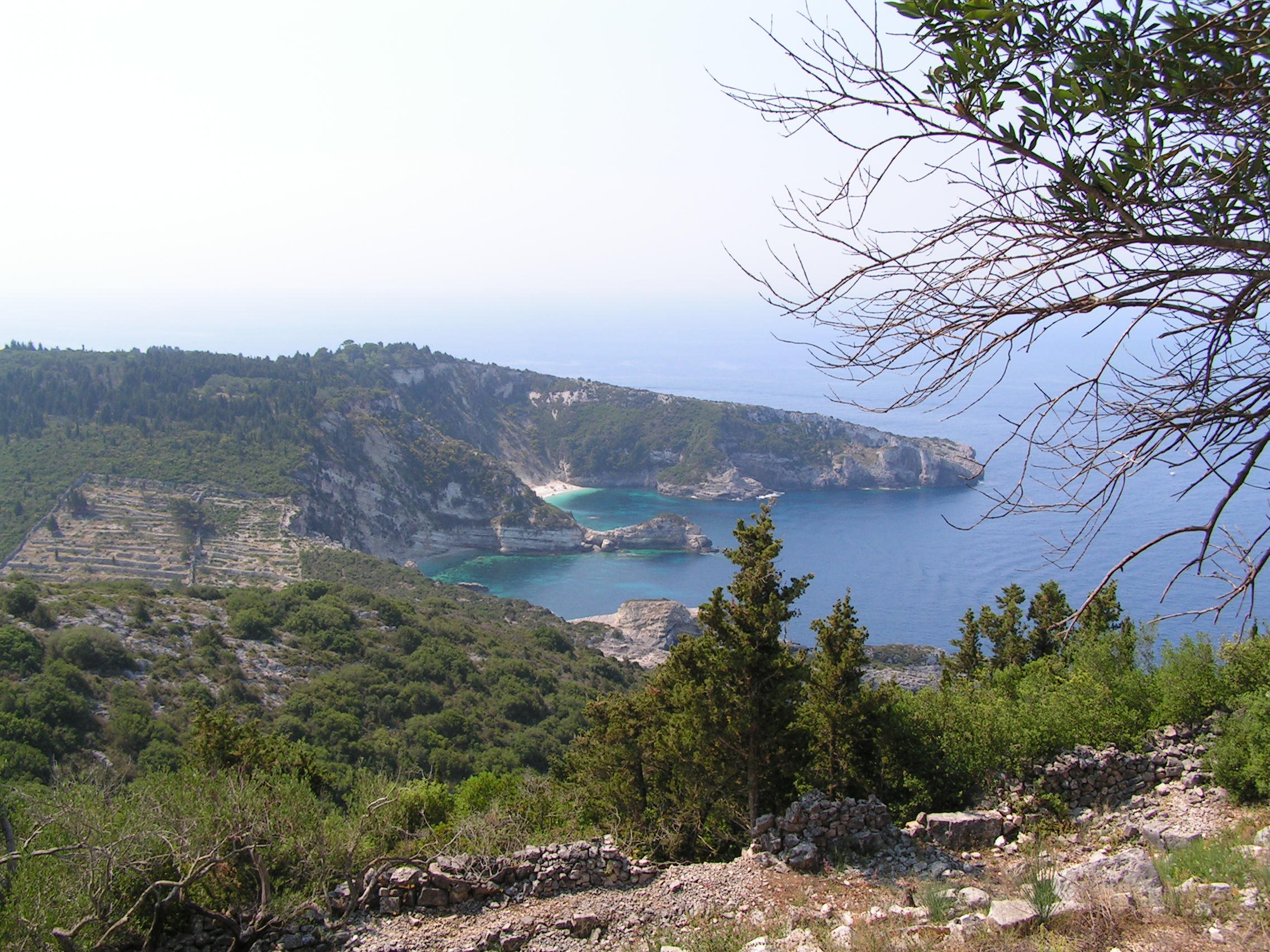 Uitzicht aan de westzijde van Paxi, kijkend naar het zuiden. Deze foto is gemaakt door de initiele auteur van deze bijdrage tijdens een zeilreis door Griekenland.